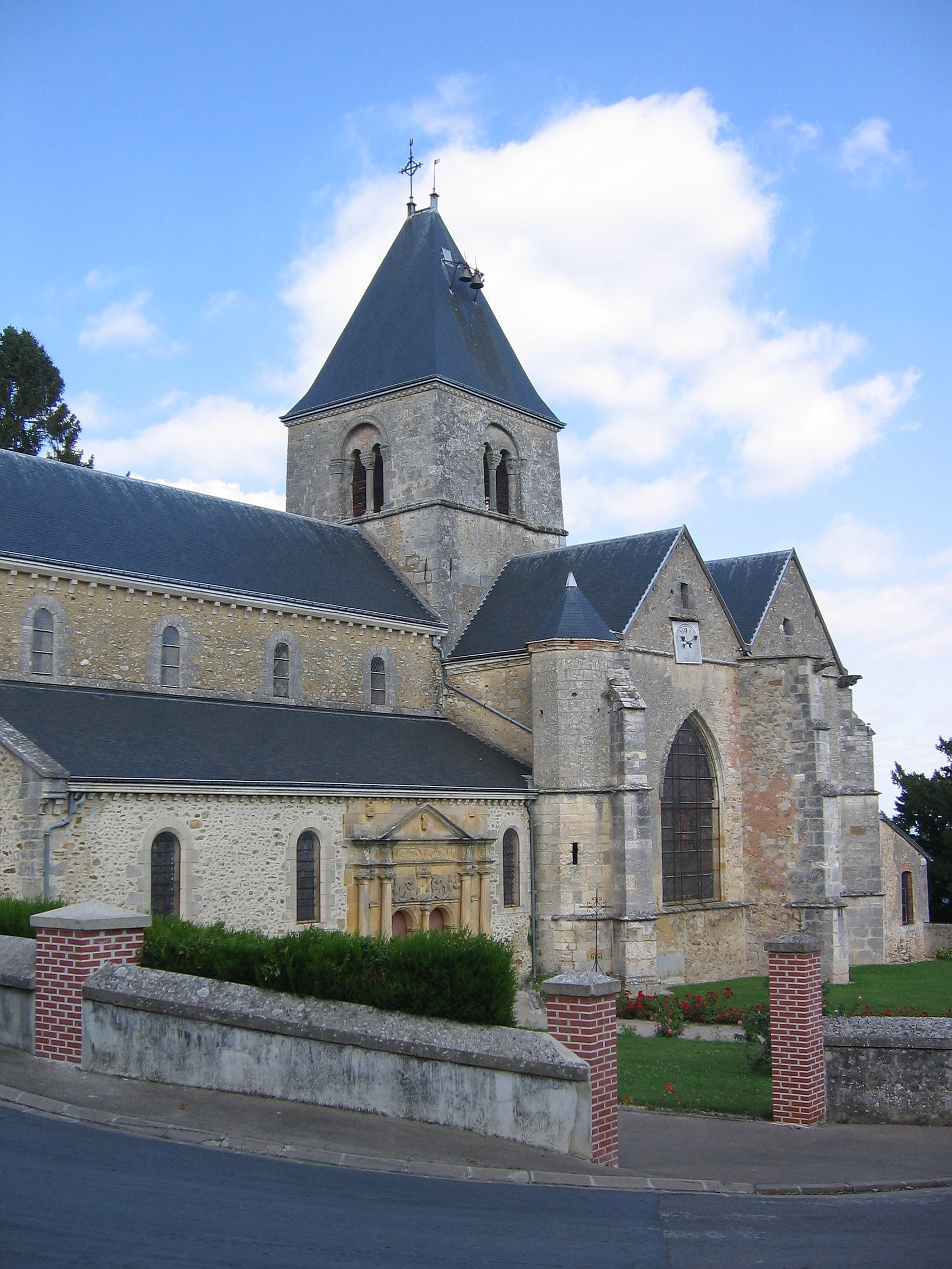 Eglise du Mesnil sur Oger